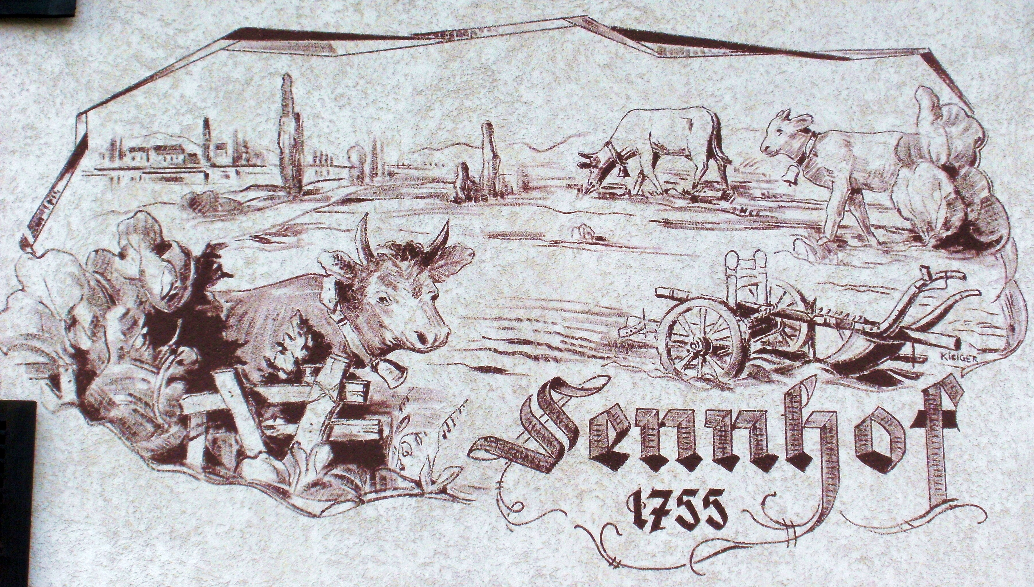 Fassadenfresko von Julius Kibiger (1903-1983) am Sennhof in Rheinfelden (Baden), Ortsteil Warmbach.